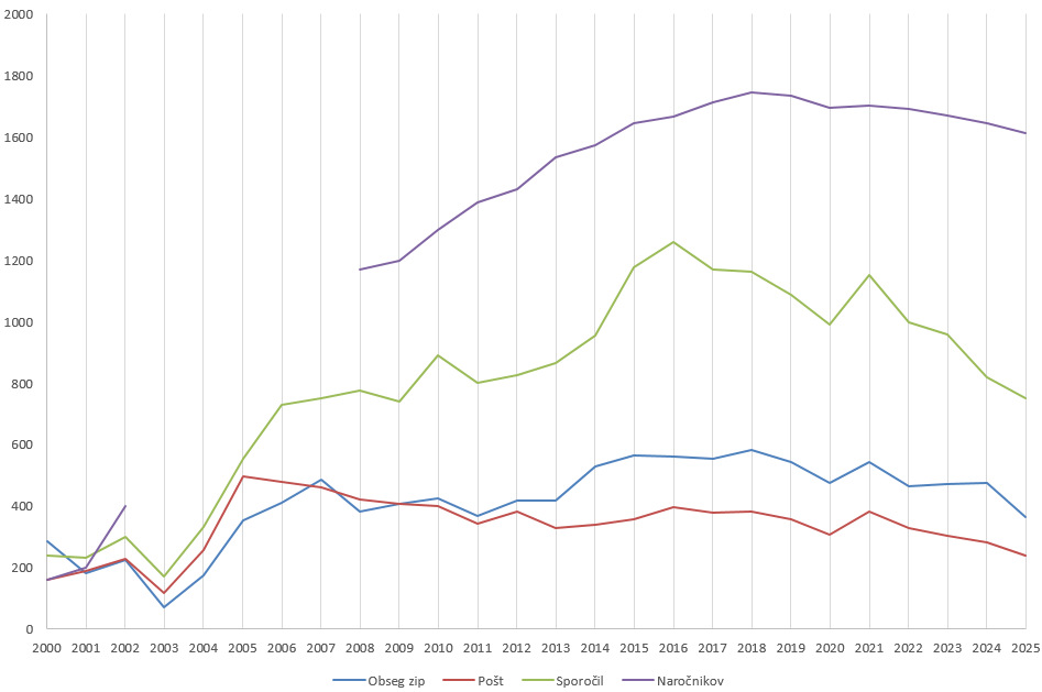 Slovlit